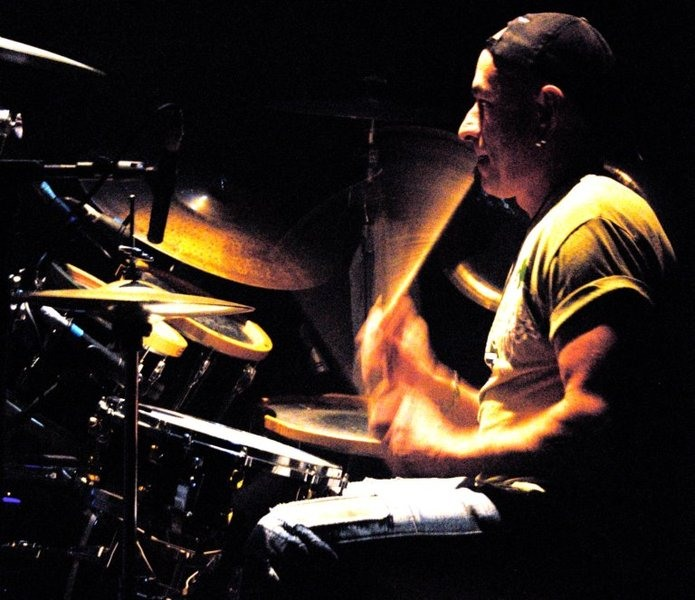 Ian Proërer